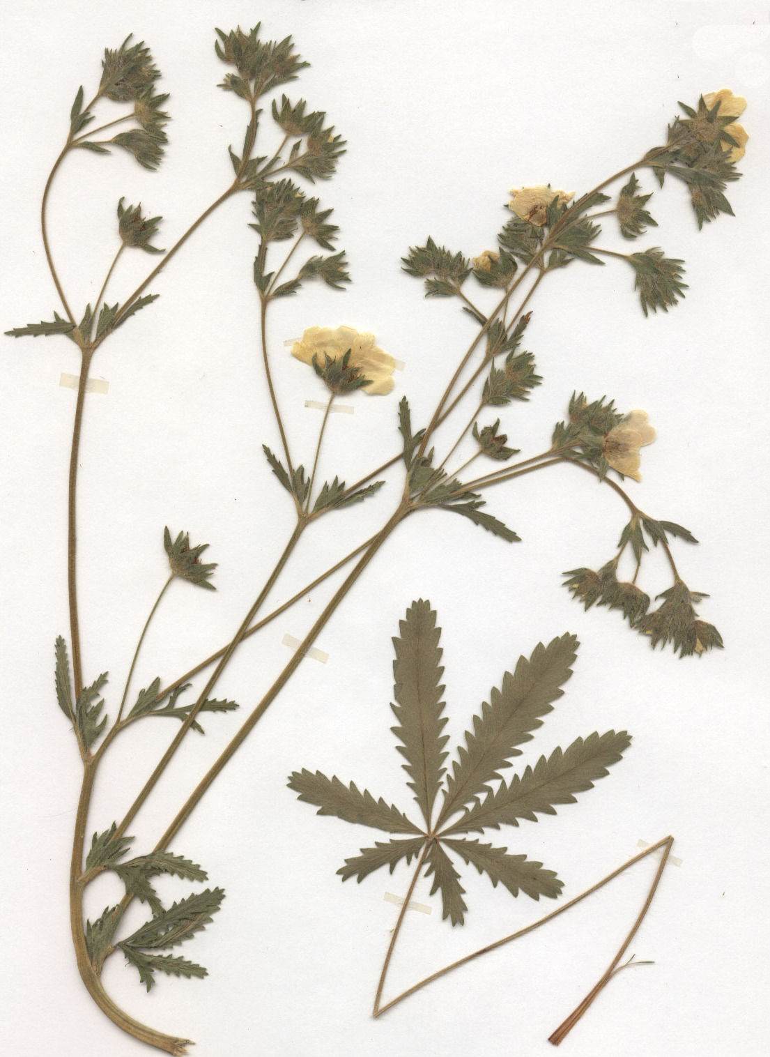 Potentilla recta ssp recta, eigener Herbarbeleg von 1988, Unterfranken